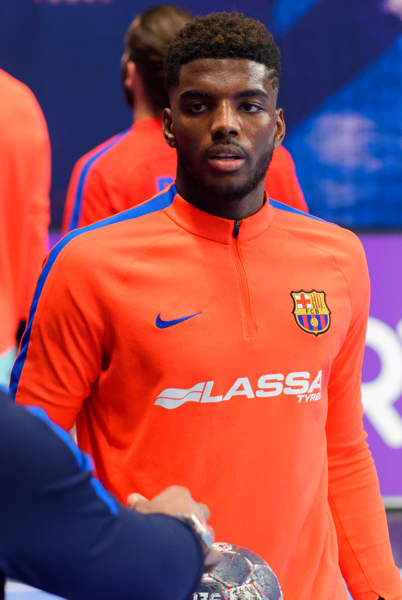 Rencontre de phase de groupe de la ligue des champions 2016-17 entre le PSG et le FC Barcelone. A Coubertin, le 12 novembre 2016.